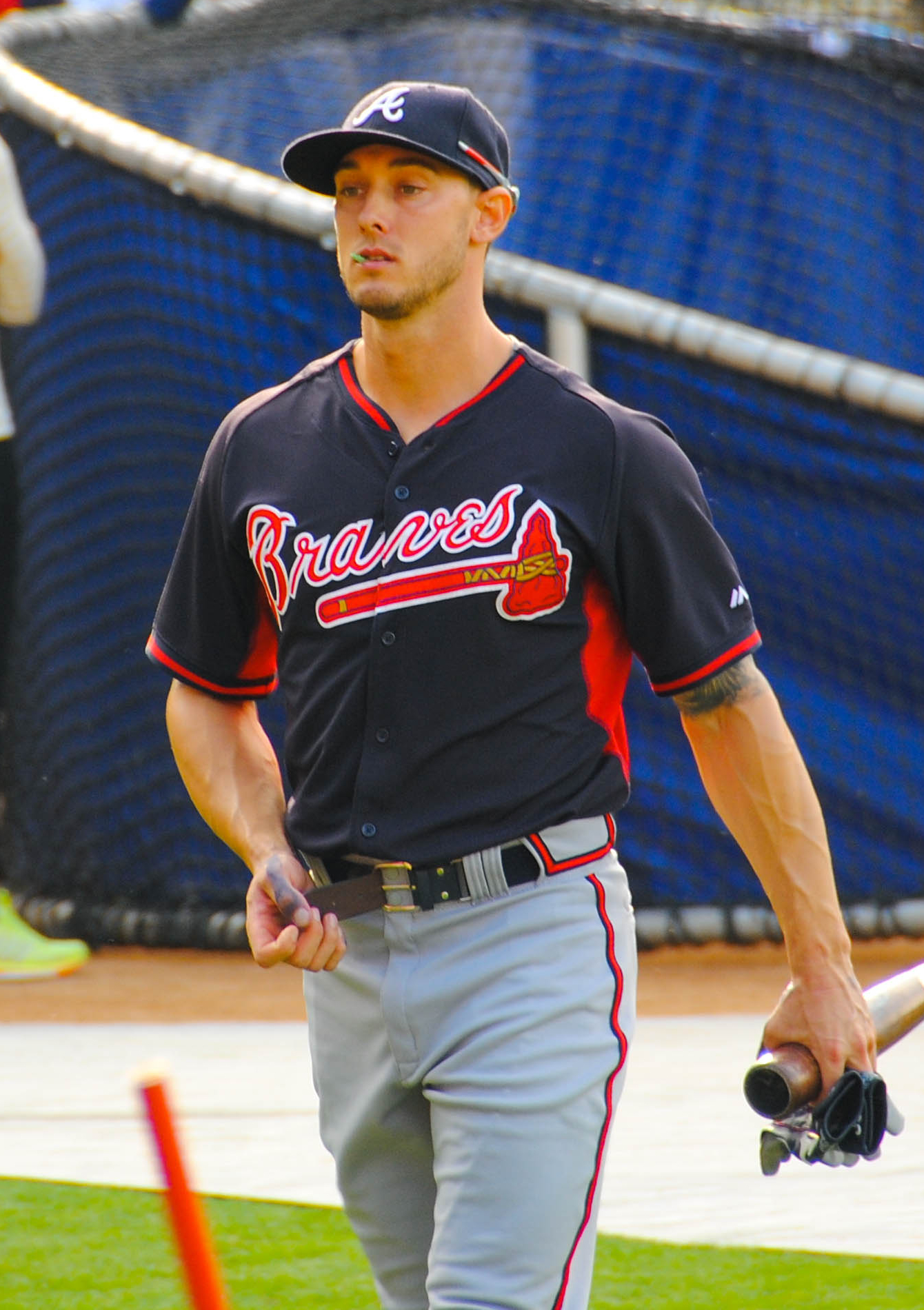 Jordan Schafer